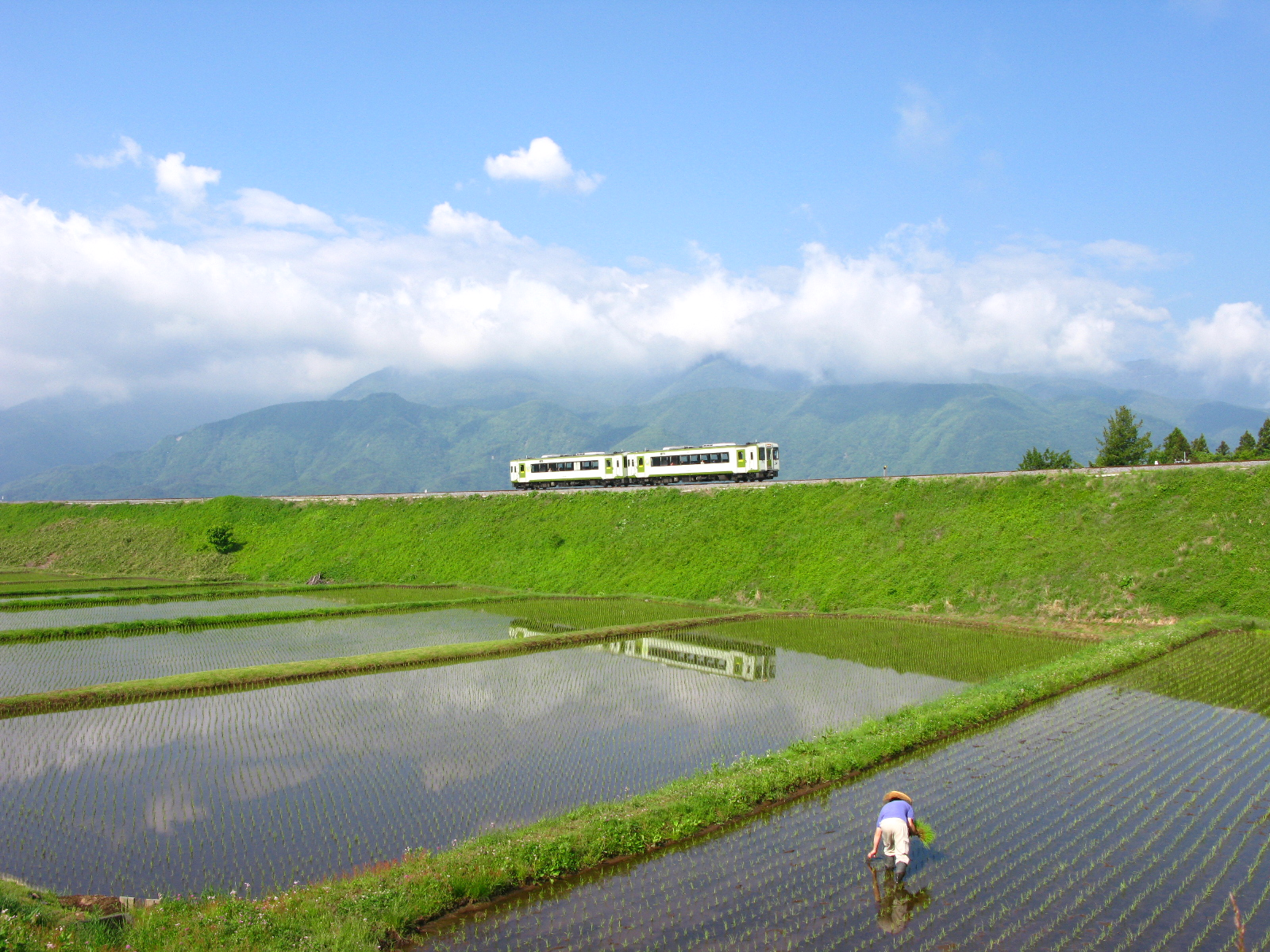 JR小海線の小淵沢～甲斐小泉で撮影した初夏の小海線。